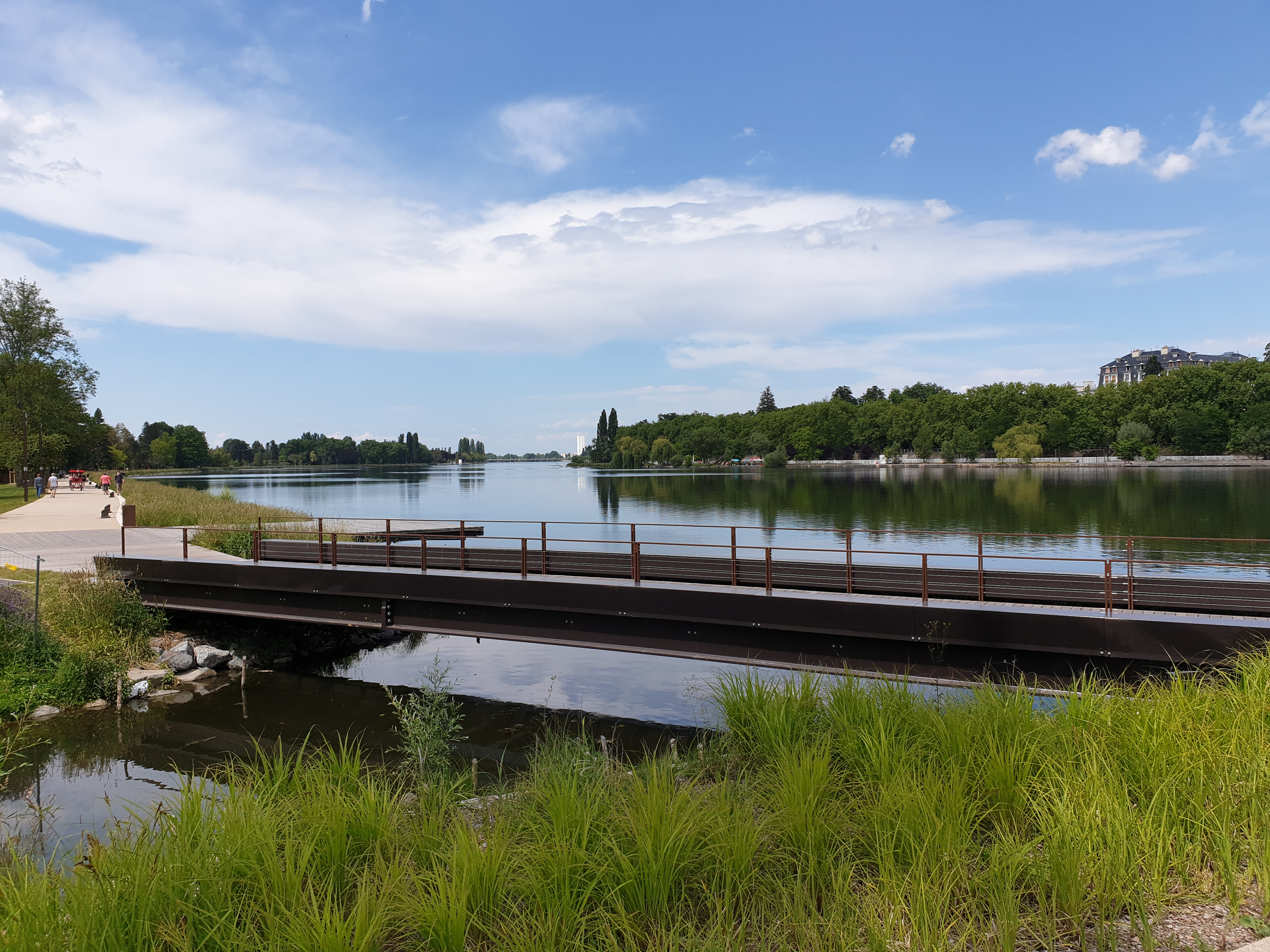 Passerelle piétonne au dessus du Salmon, Bellerive-sur-Allier